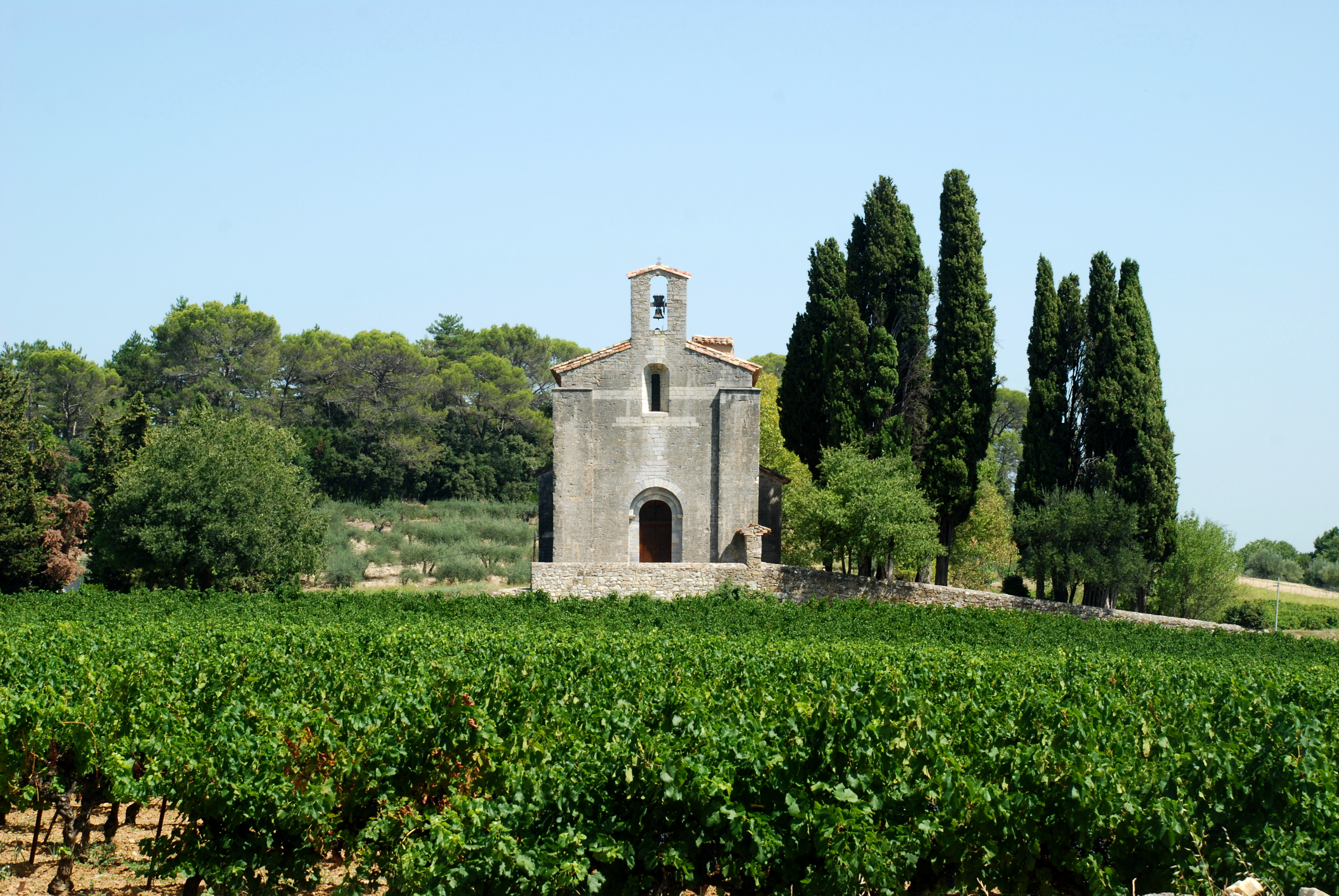 France - Gard - Église Saint-Baudile de Tornac